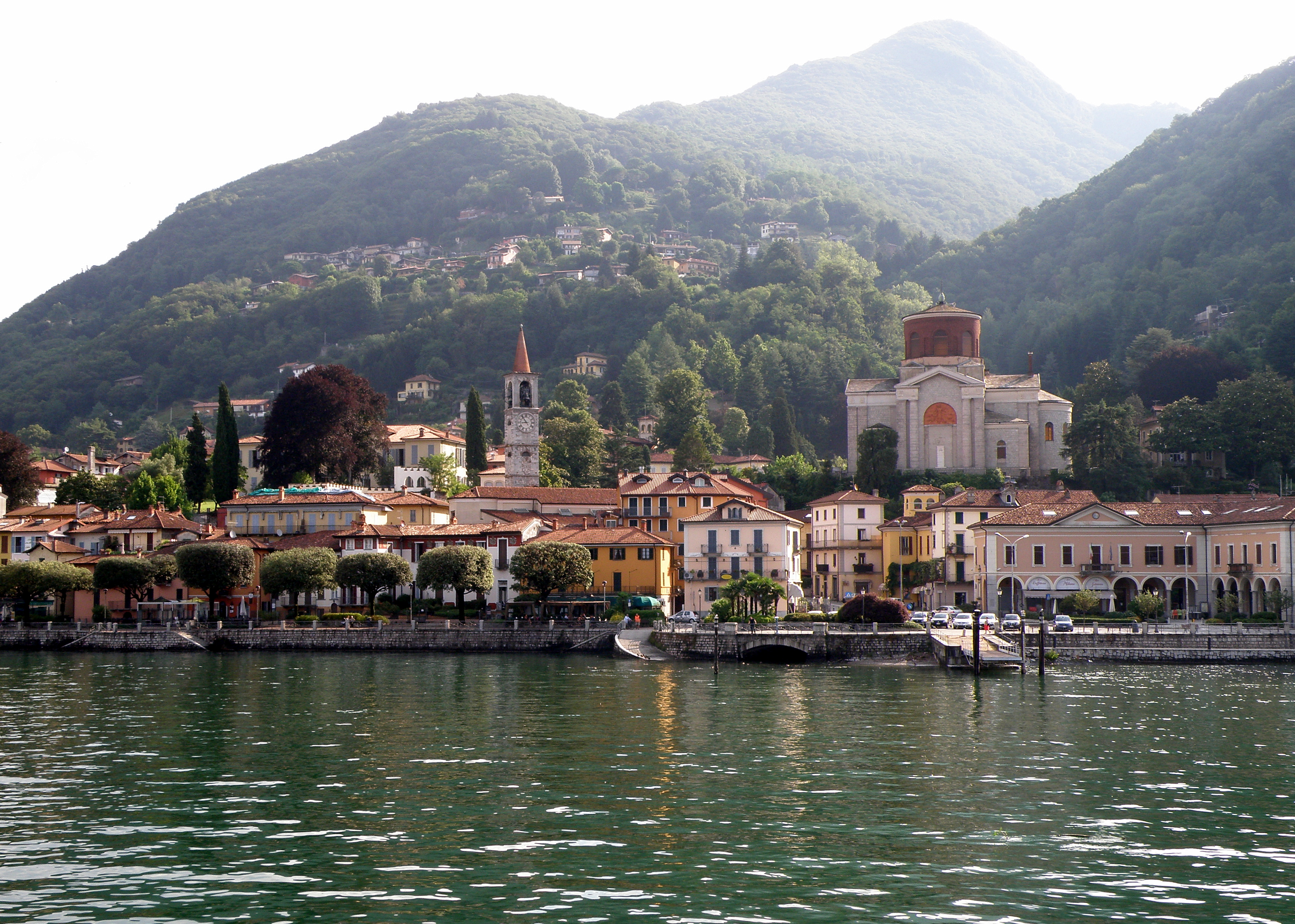 Laveno-Mombello (VA), vue prise depuis le bac (traghetto) de Verbania. À droite, église Saint-Ambroise (Chiesa di Sant'Ambrogio, dite Chiesa Nuova), de type néo-byzantin, juchée sur son esplanade surélevée. Au centre gauche, clocher élancé de l'église Saint-Philippe-et-Jacques (Chiesa di San Filippo e Giacomo, dite aussi Chiesa Vecchia). Bordant le quai tout à droite, l'ancienne mairie (devenu espace commercial) ; on entrevoit un peu la nouvelle mairie (la Villa De Angeli-Frua) derrière un arbre pourpre un peu à gauche du clocher de Saint-Philippe-et-Jacques. Au fond à droite, partiellement visible, le Sasso del Ferro. Au centre, dans le lointain, silhouette brumeuse du Monte Nudo. Nous regardons vers l'est-nord-est.